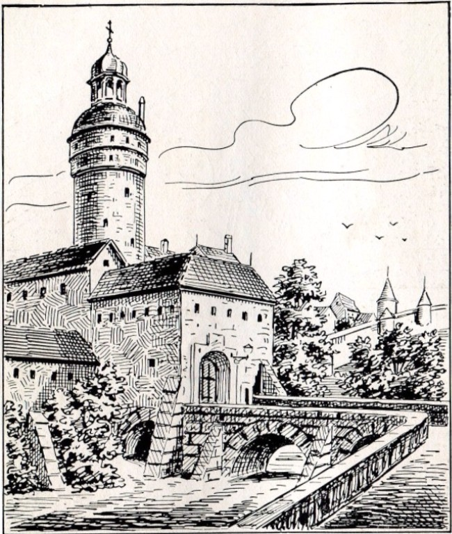 Nikolaitor in Görlitz